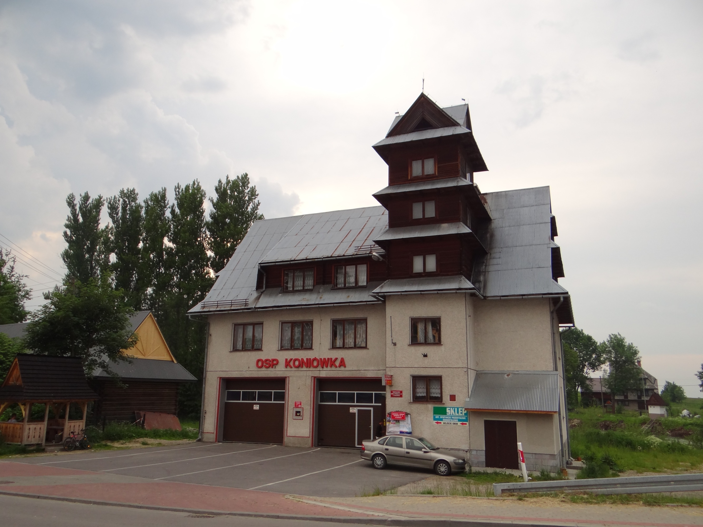 Remiza OSP w Koniówce